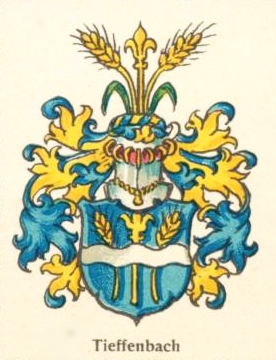 Wappen derer Tieffenbach, einem Neuruppin-Berliner Ratsherrengeschlecht.